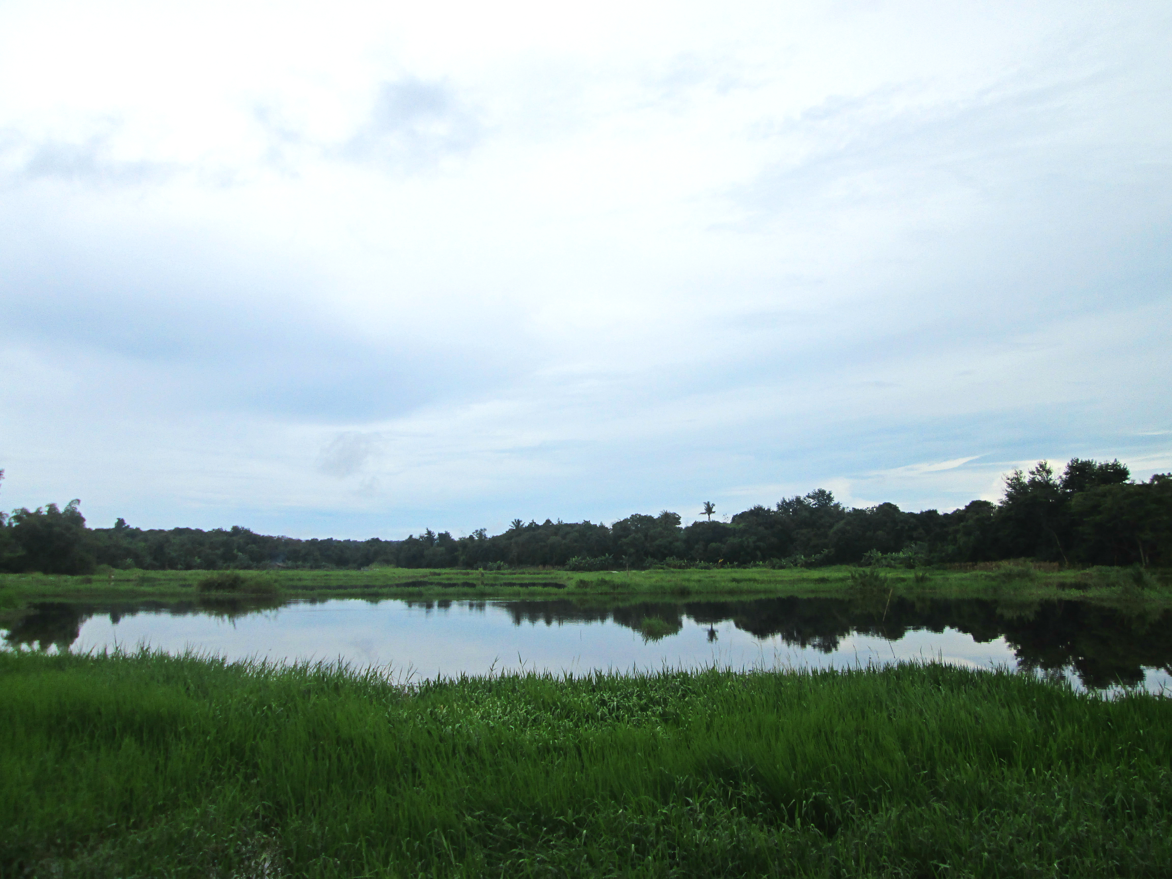 sình đỉa 1